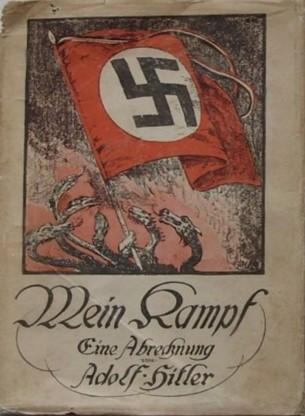 Albert Reich (1881–1942) – Einbandentwurf für "Mein Kampf"